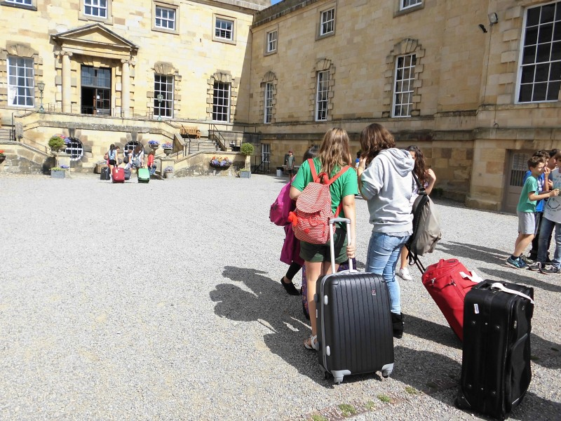 Grupo de estudiantes de intercambio de verano llegando su destino en Inglaterra.